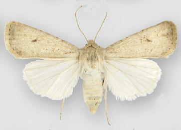 Euxoa tronellus female